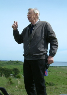 Prof. Günter Möbus auf der Geotop-Tagung 2004 auf Hiddensee